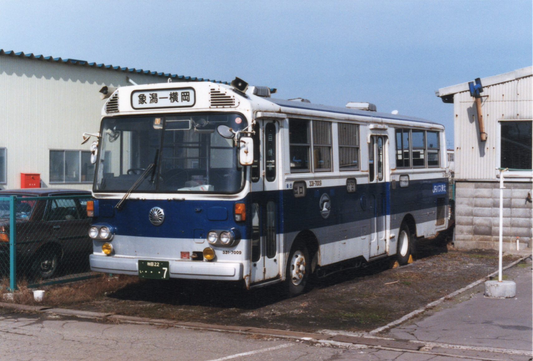 象潟営業所にて、許可を得て撮影